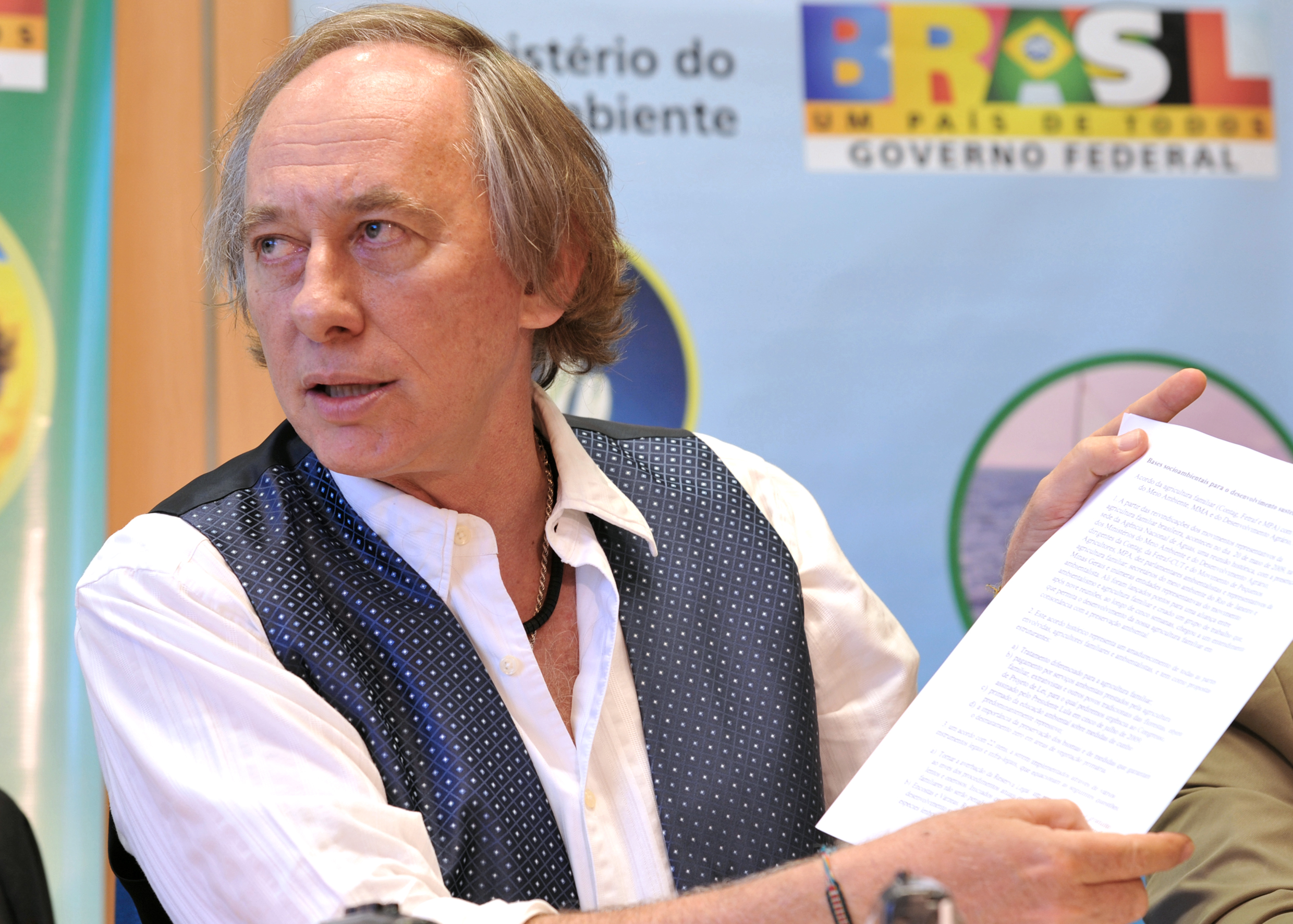 O ministro do Meio Ambiente, Carlos Minc, anuncia em entrevista coletiva detalhes do acordo firmado com a agricultura familiar.